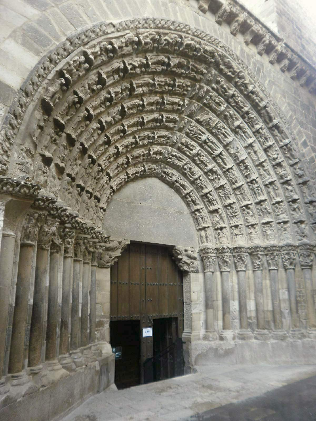 Catedral de Santa María de Tudela (Navarra). Portada del Juicio